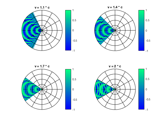 Mach'scher Kegel